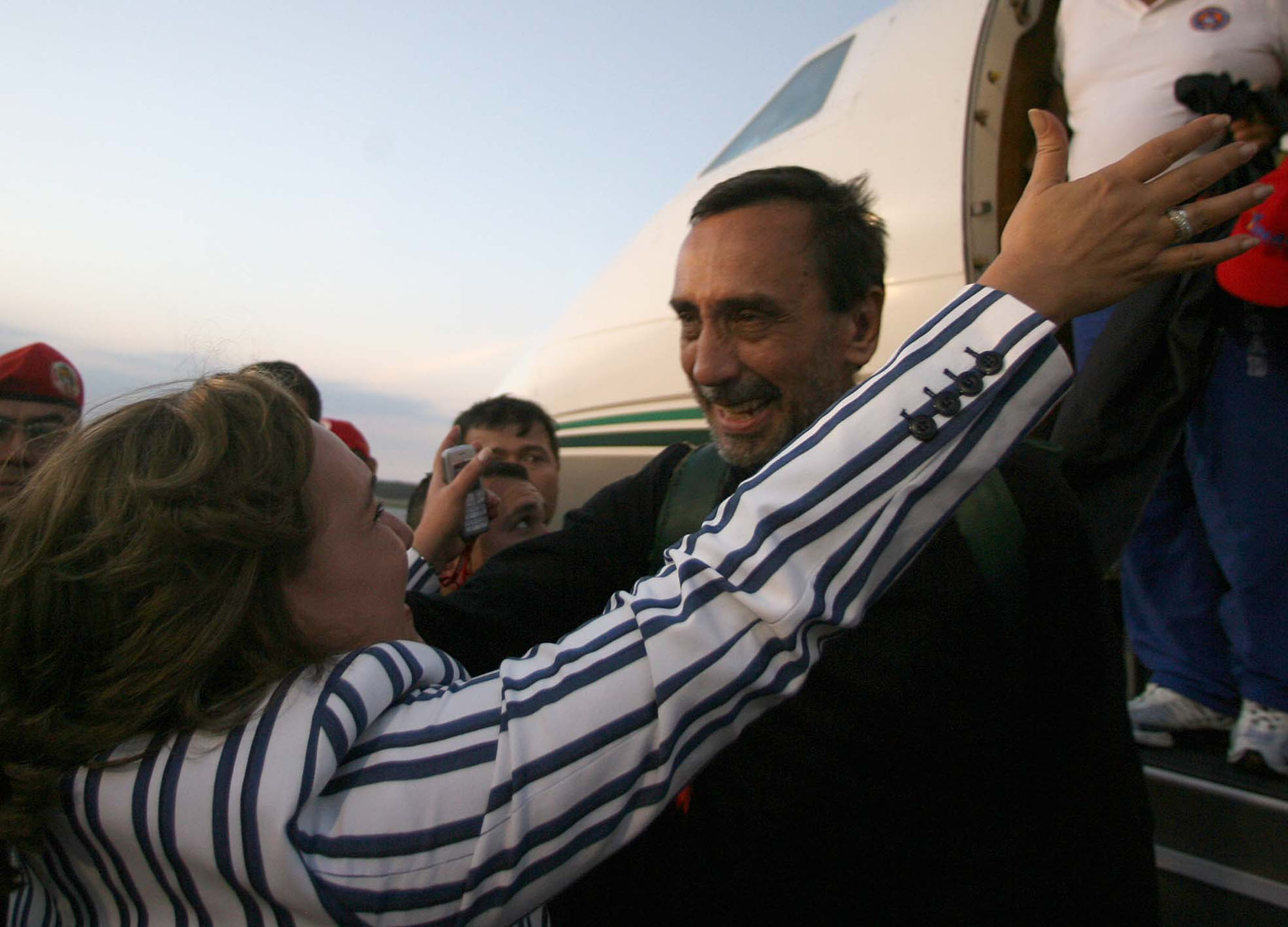 Ángela de Pérez recibió con los brazos abiertos a su esposo, el ex congresista Luis Eladio Pérez, luego de su liberación por las FARC; desde el Aeropuerto Internacional Simón Bolívar en Maiquetía.